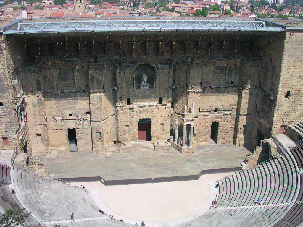 vue sur la partie scène du théâtre antique de jour